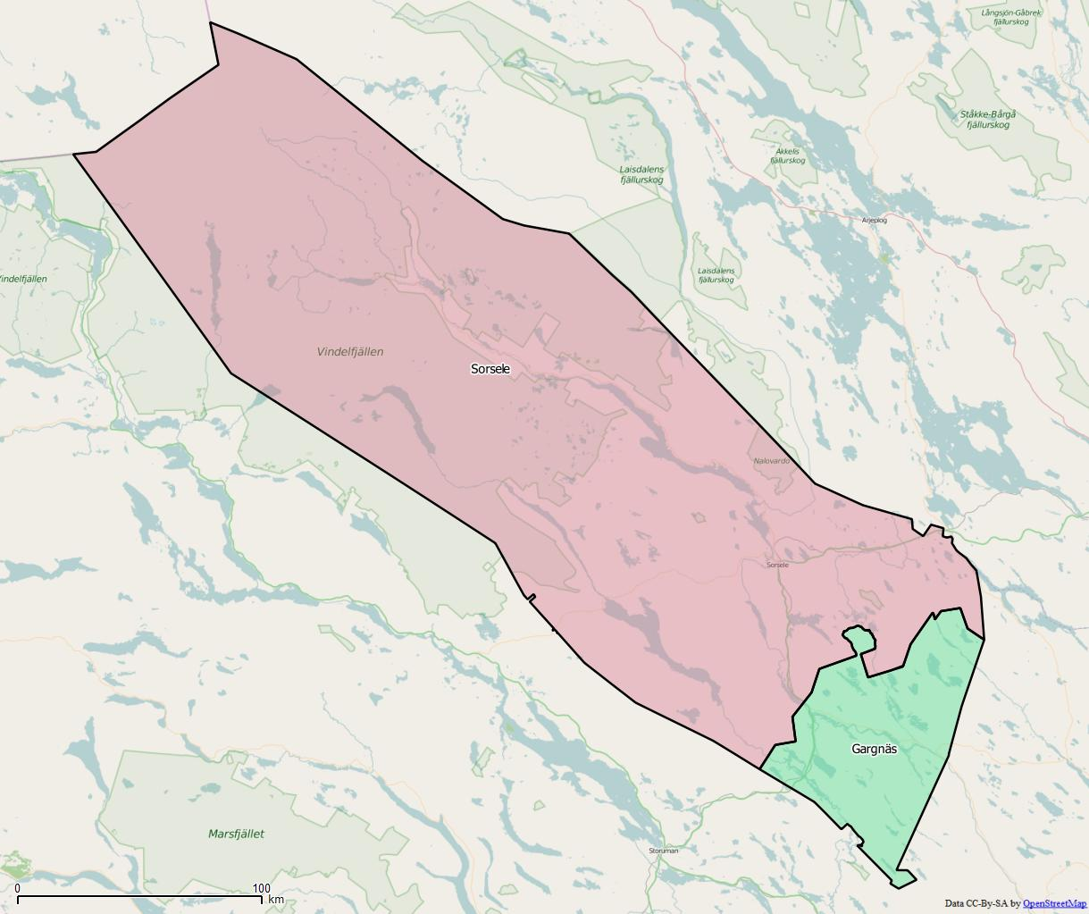 Distriktsindelningen i Skurups kommun World file: 365.16511986473119578 0 0 -365.16511986473119578 1634635.77155083208344877 9980904.55260028690099716